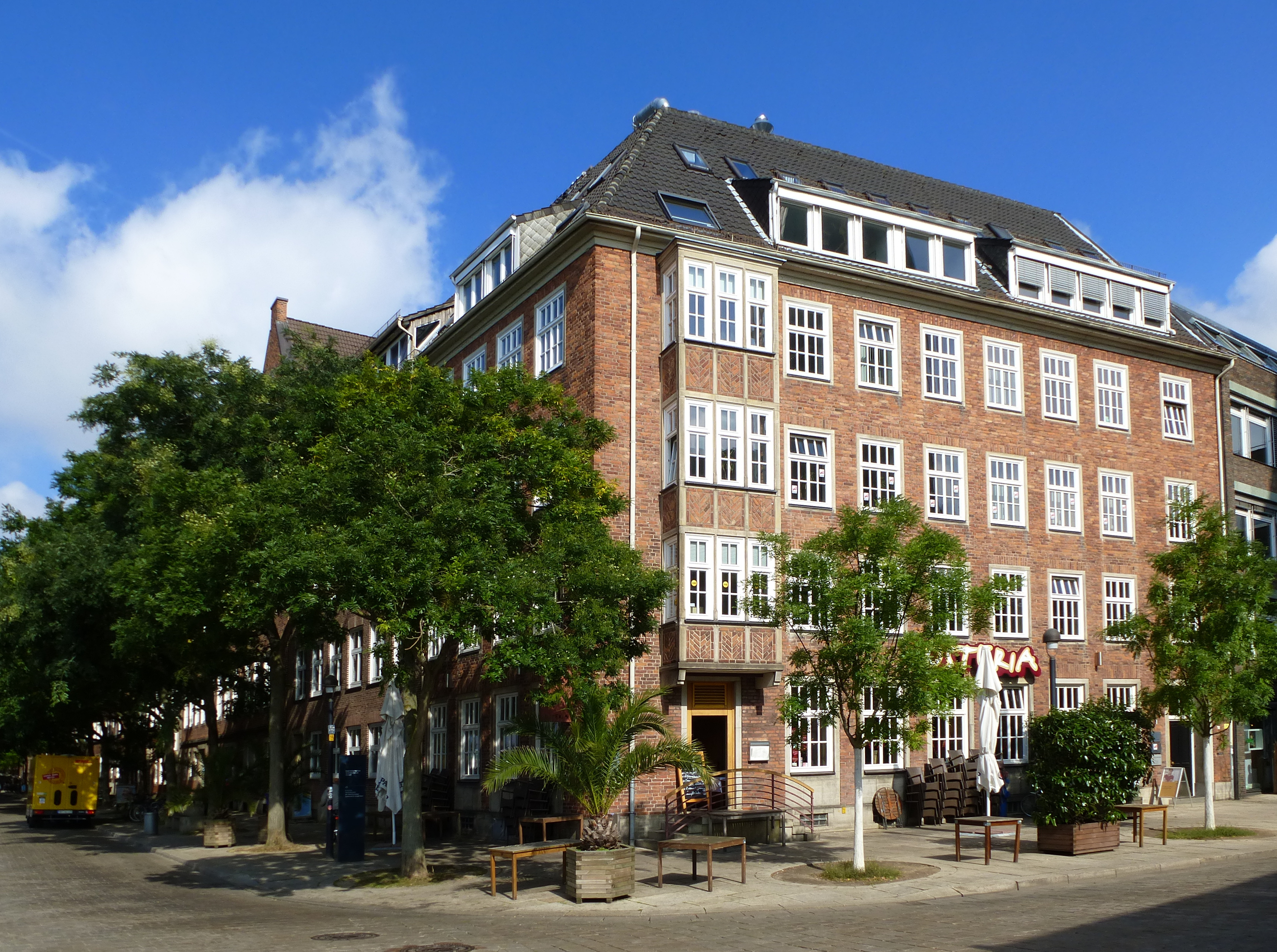 Geschäftshaus in Bremen, Erste Schlachtpforte 1Das abgebildete Objekt ist ein geschütztes Kulturdenkmal in der Freien Hansestadt Bremen, mit der Nr. 0853 beim Landesamt für Denkmalpflege registriert.